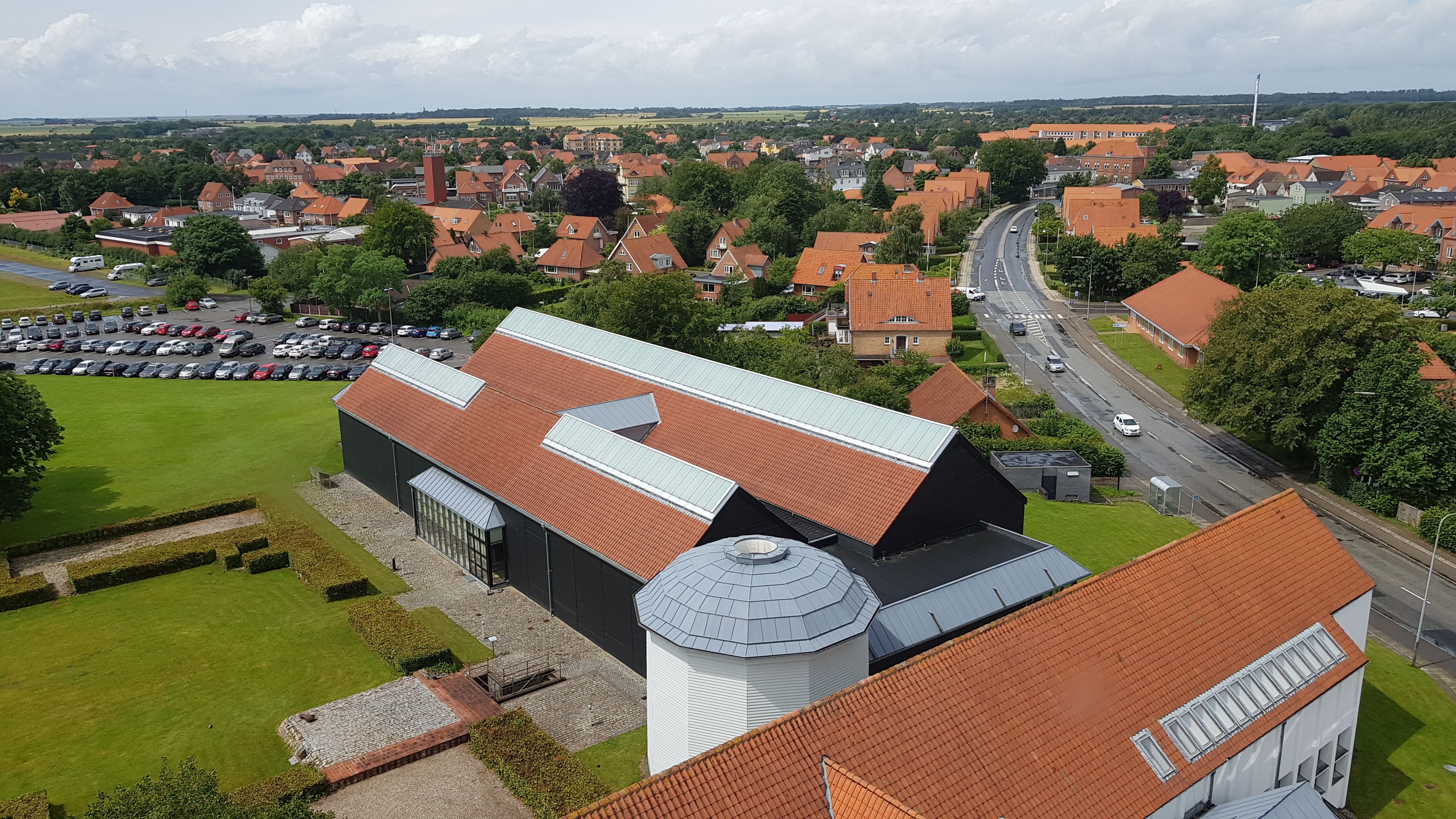 Kunstmuseet i Tønder set fra Vandtårnet